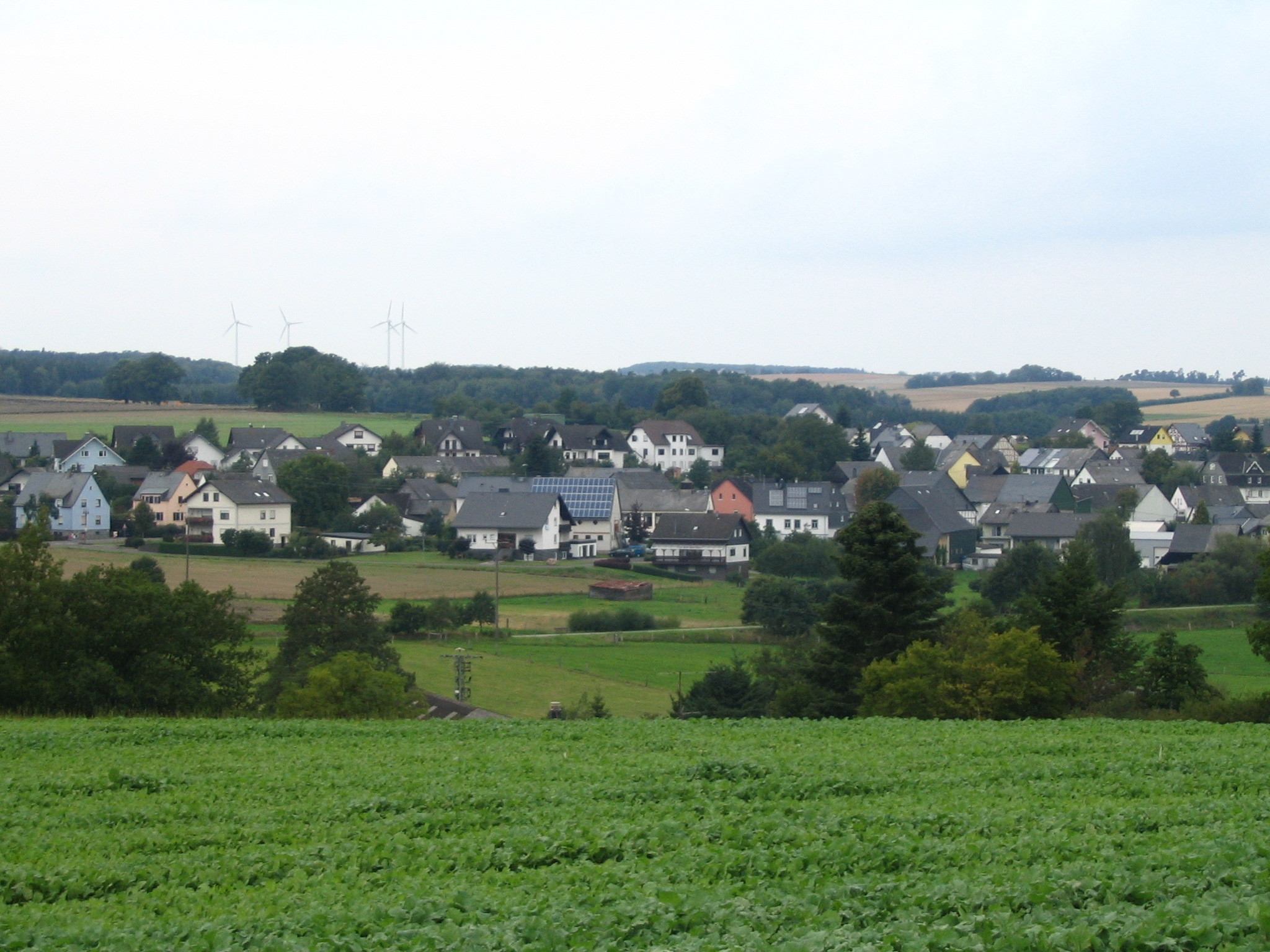 Külz im Hunsrück